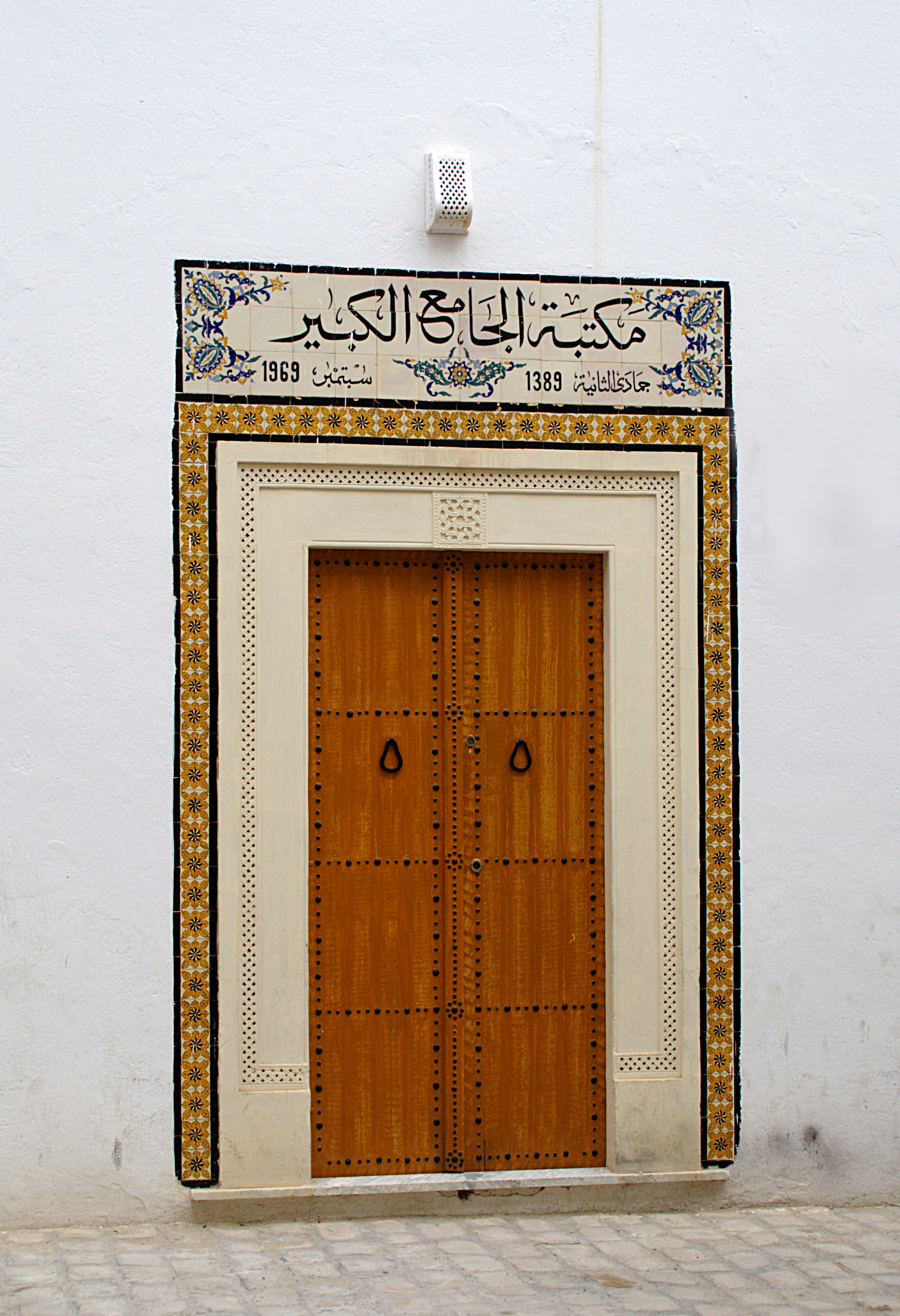 La grande Mosquée de Nabeul, Nabeul